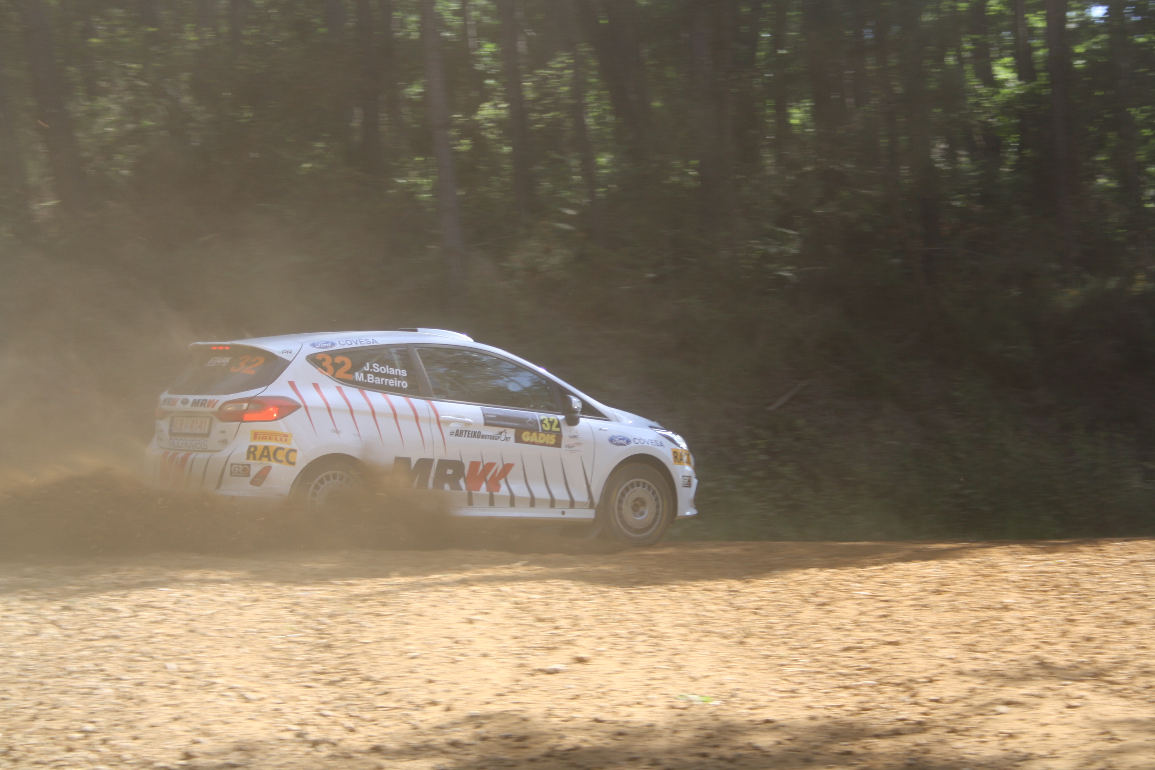 Rally Terra da Auga. Cuarta prueba del campeonato de España de rallies de tierra 2019 y tercera del Súper Campeonato de España de Rally.